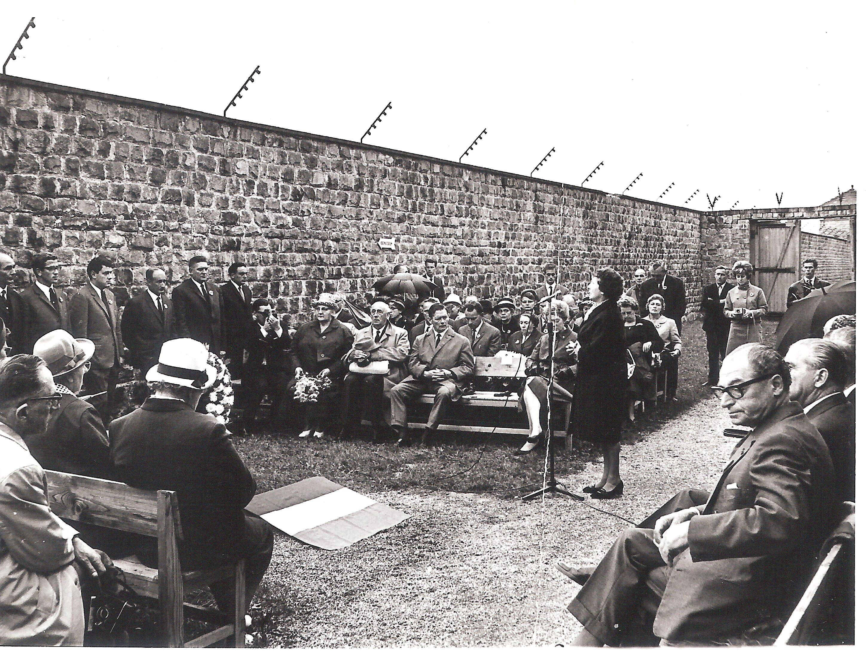 Op 6 & 7 september 1944 zijn alle Nederlandse geheime agenten die door de Duitsers waren opgepakt, zo ook Jan Emmer uit Zwanenburg, in het concentratiekamp Mauthausen doodgeschoten en gecremeerd. Een ploeg gevangenen heeft hun as stiekem begraven. Op die plek is na de oorlog een In Memoriam-plaquette onthuld. De plechtigheid werd onder andere bijgewoond door de moeder van Jan Emmer, Maartje Knoppers-Boekelaar (zittend op het bankje vlakbij de muur).